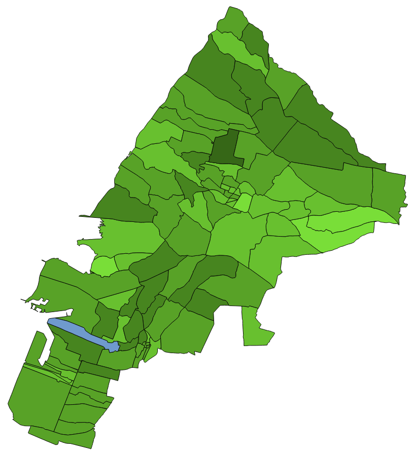 顏色對照表